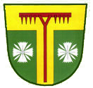 Znak obce Slavkov